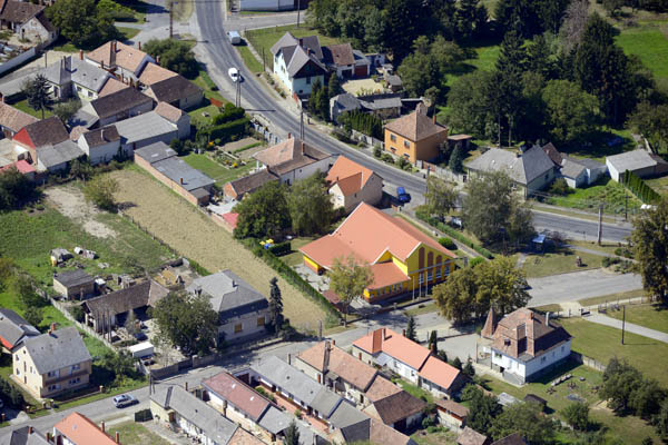 Peresznye légi fotó